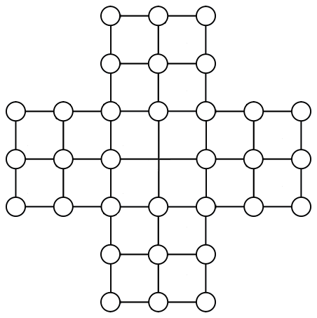 Diagrama de la posición inicial del juego Senku.